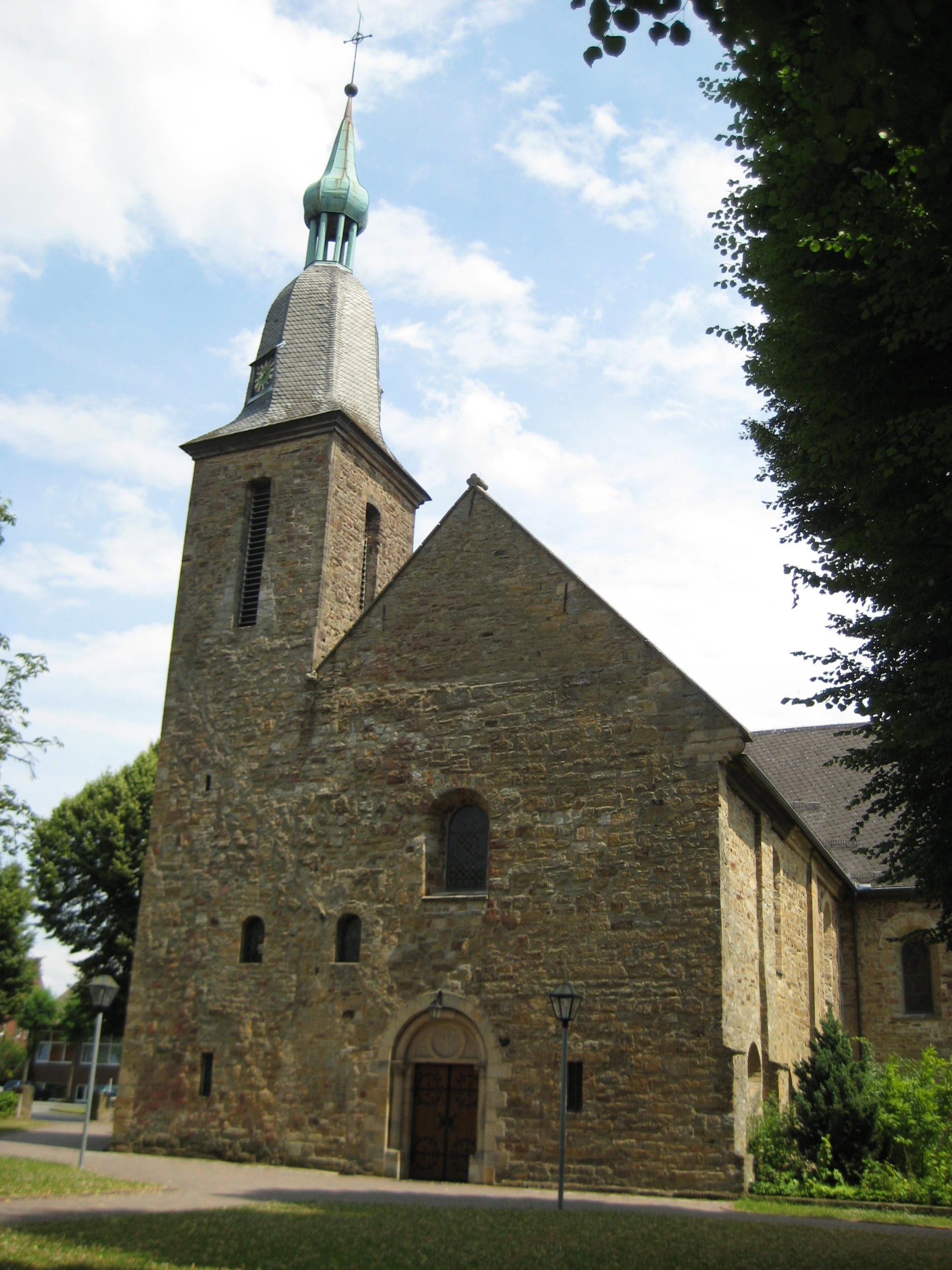 Ehemalige Klosterkirche des Klosters Oesede, jetzt Pfarrkirche St. Johann (Hinweis: Der Fehler entstand beim Hochladen des Fotos unter falschem Dateinamen.)